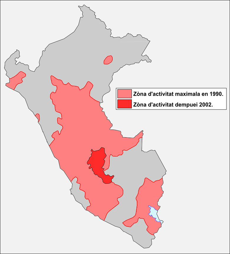 Activitat dau Sendier Luminós.